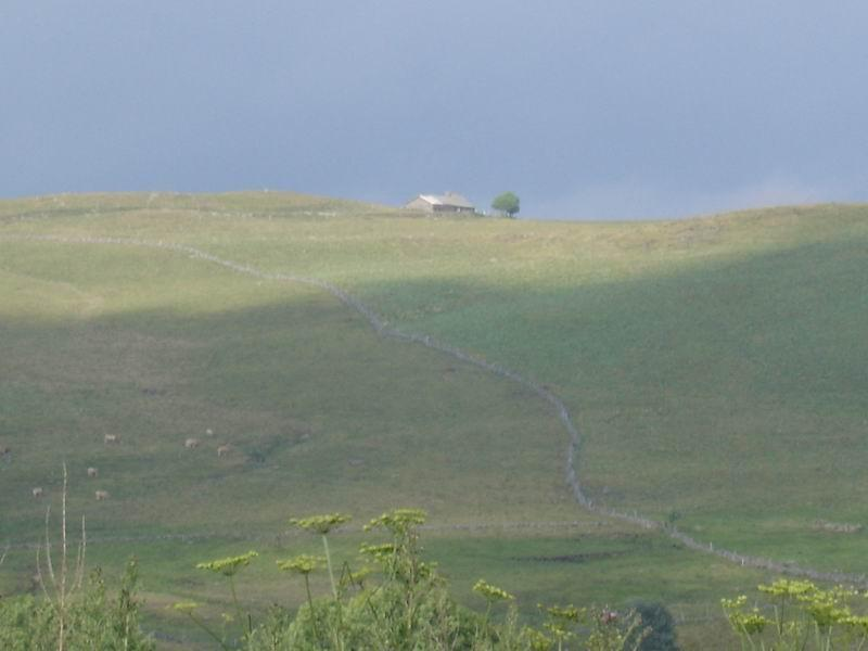 Aubrac un buron lecybersurfeur